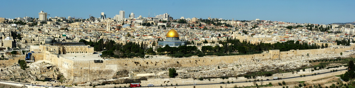 Jerusalem vom Skopusberg gesehen